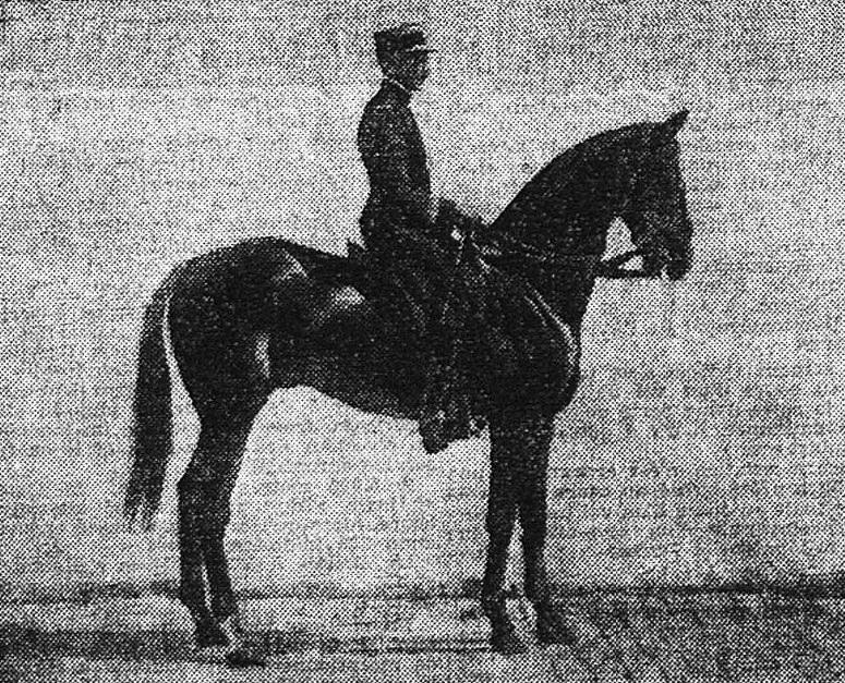 Le Commandant Xavier Lesage, en avril 1933 sur 'Taine'.